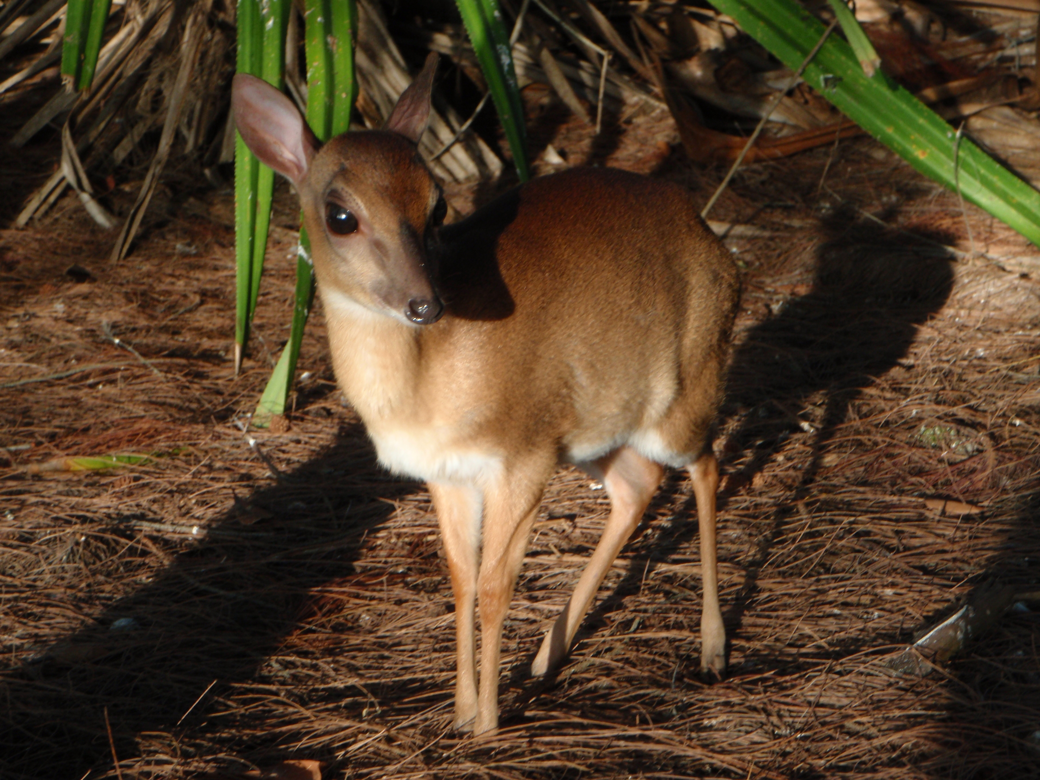 Suni in Mnemba, Zanzibar